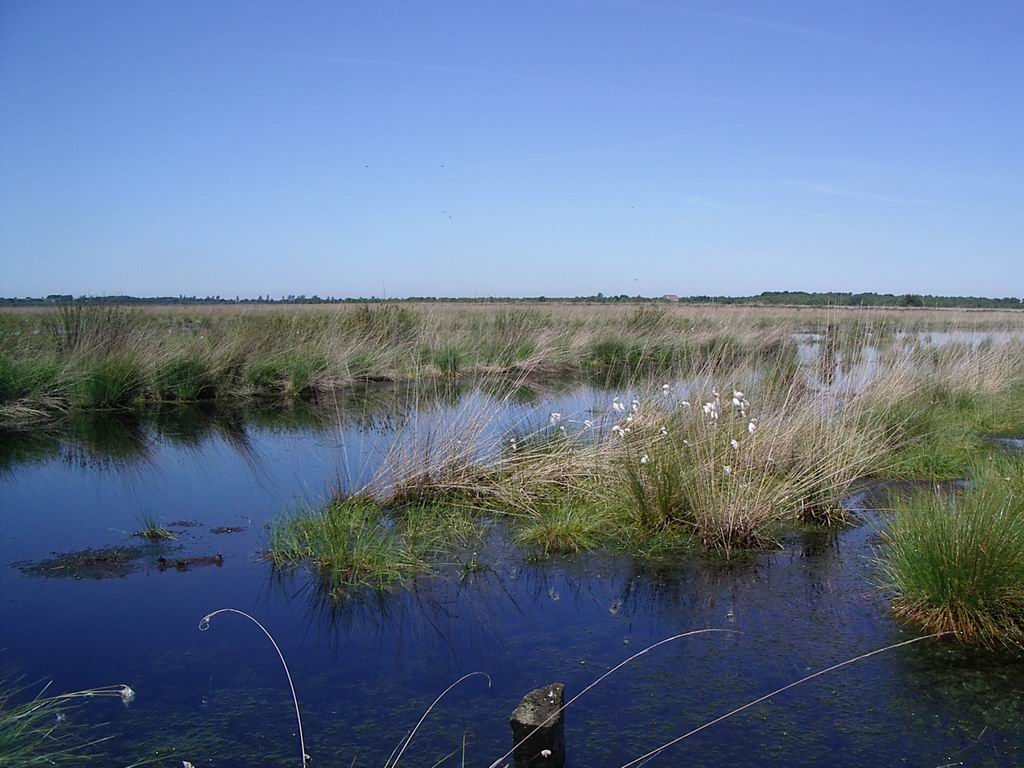 Das Ahlenmoor (renaturiert), Landkreis Cuxhaven. Foto von Benutzer:Geoz. 2005.